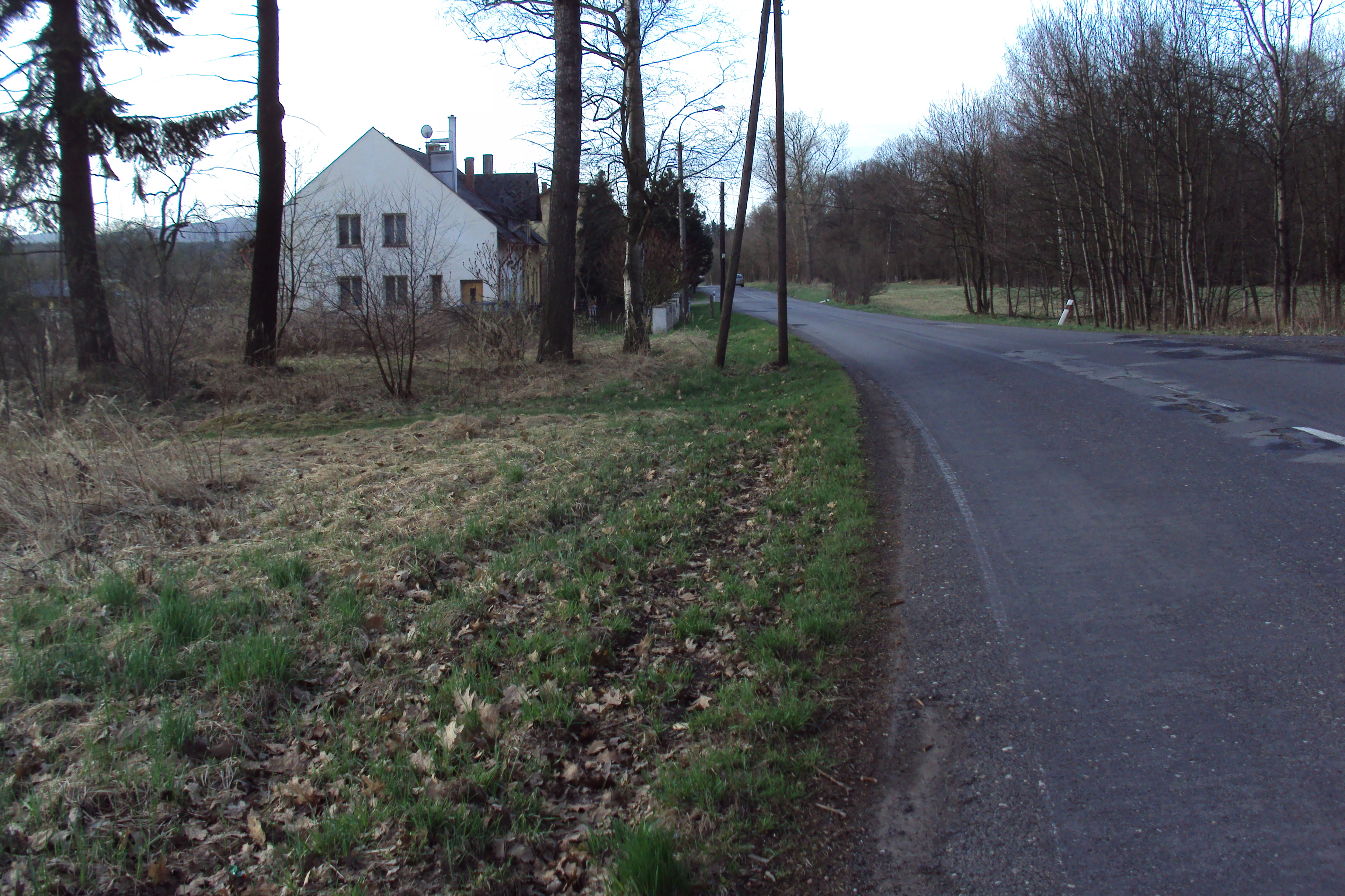 Ves Boreček z silnice 270 od Mimoně na Hradčany, Ceskolipsko